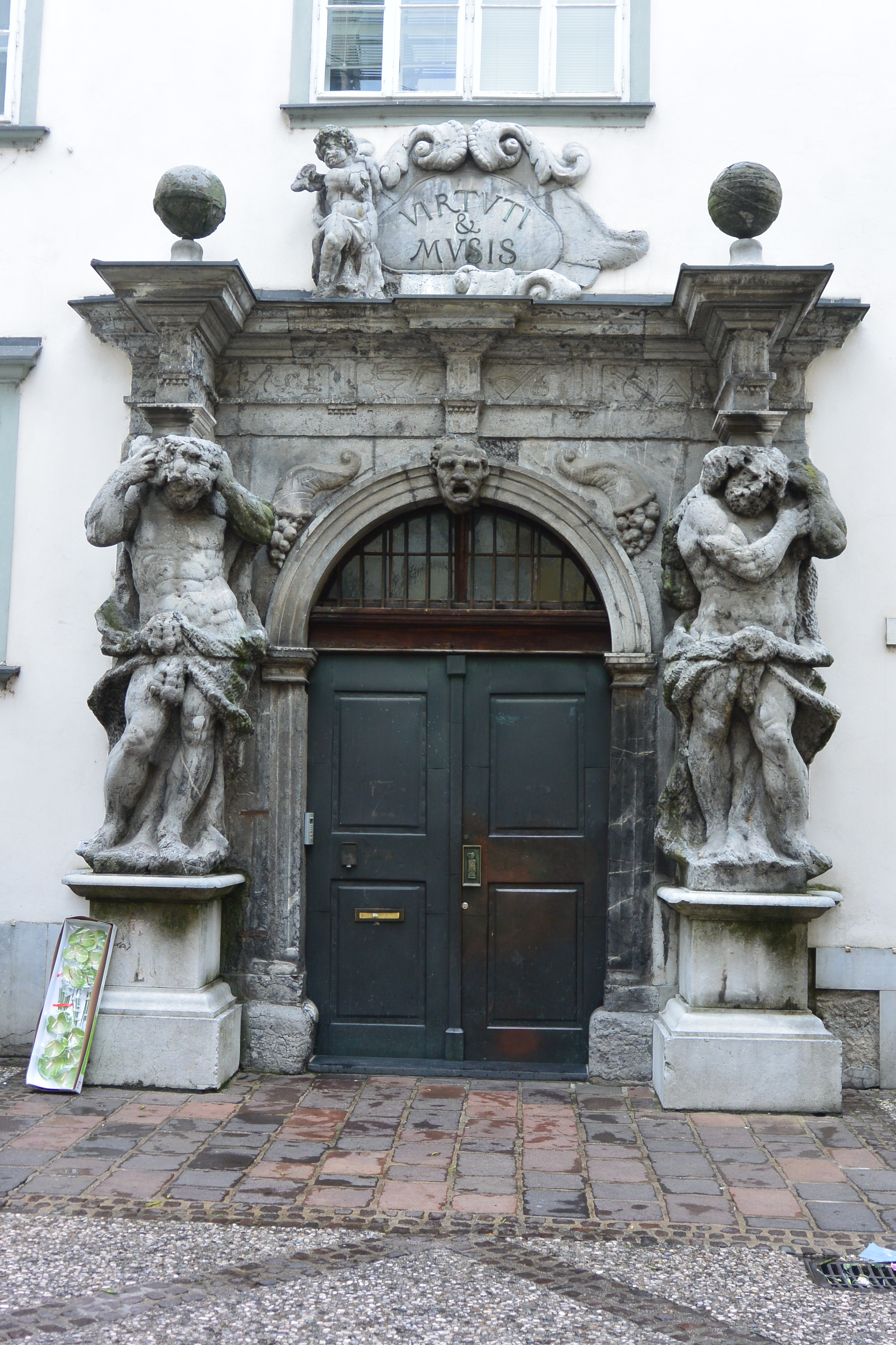 Laibach